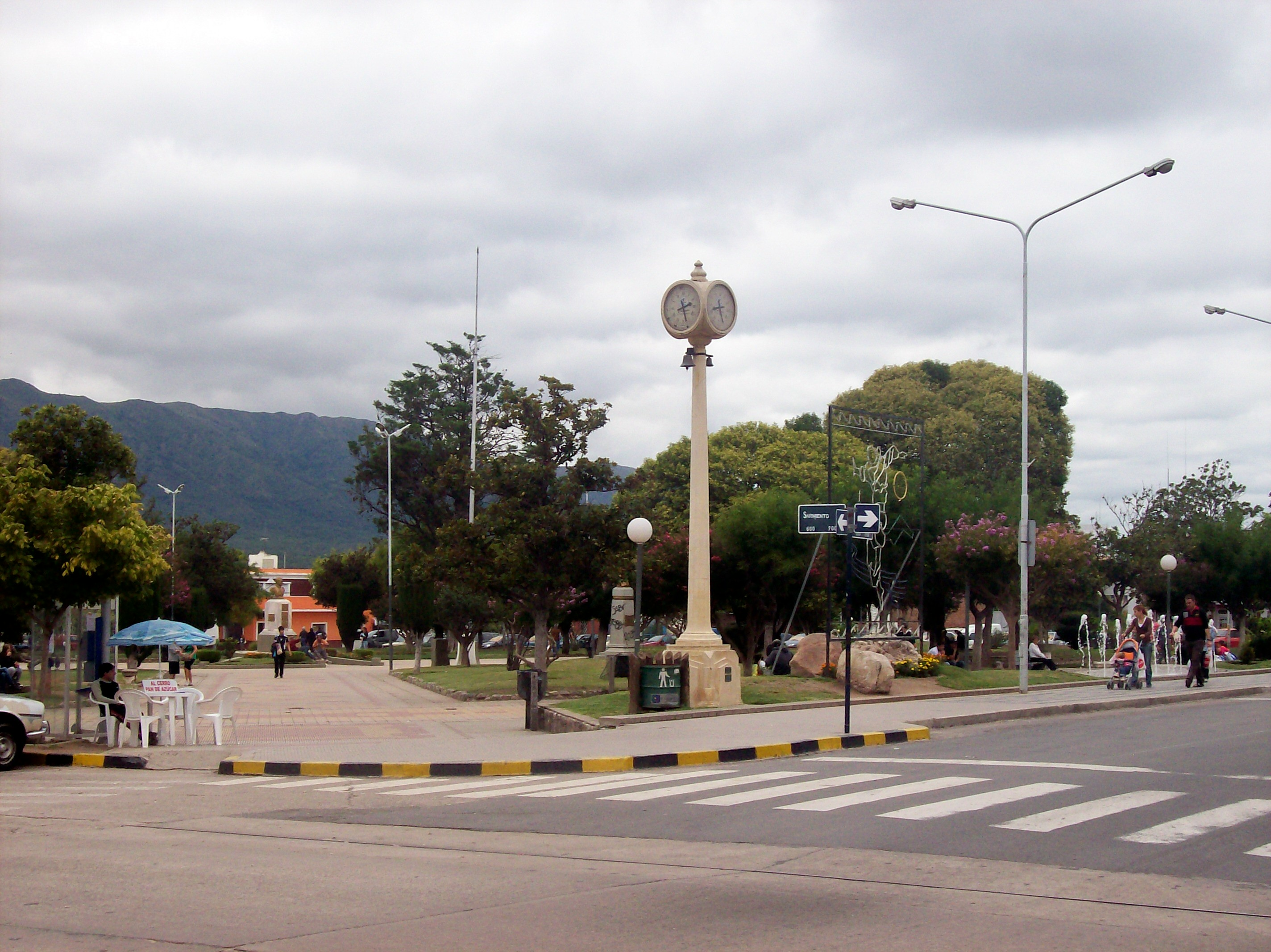 Plaza San Martín, en la ciudad de Cosquín, provincia de Córdoba, Argentina. Tomado desde San Martín y Sarmiento. (esquina Jaime Dávalos)